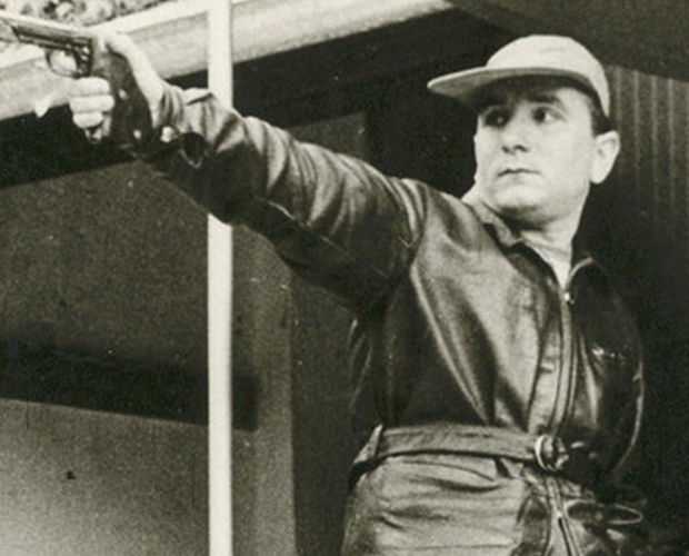 Ștefan Petrescu